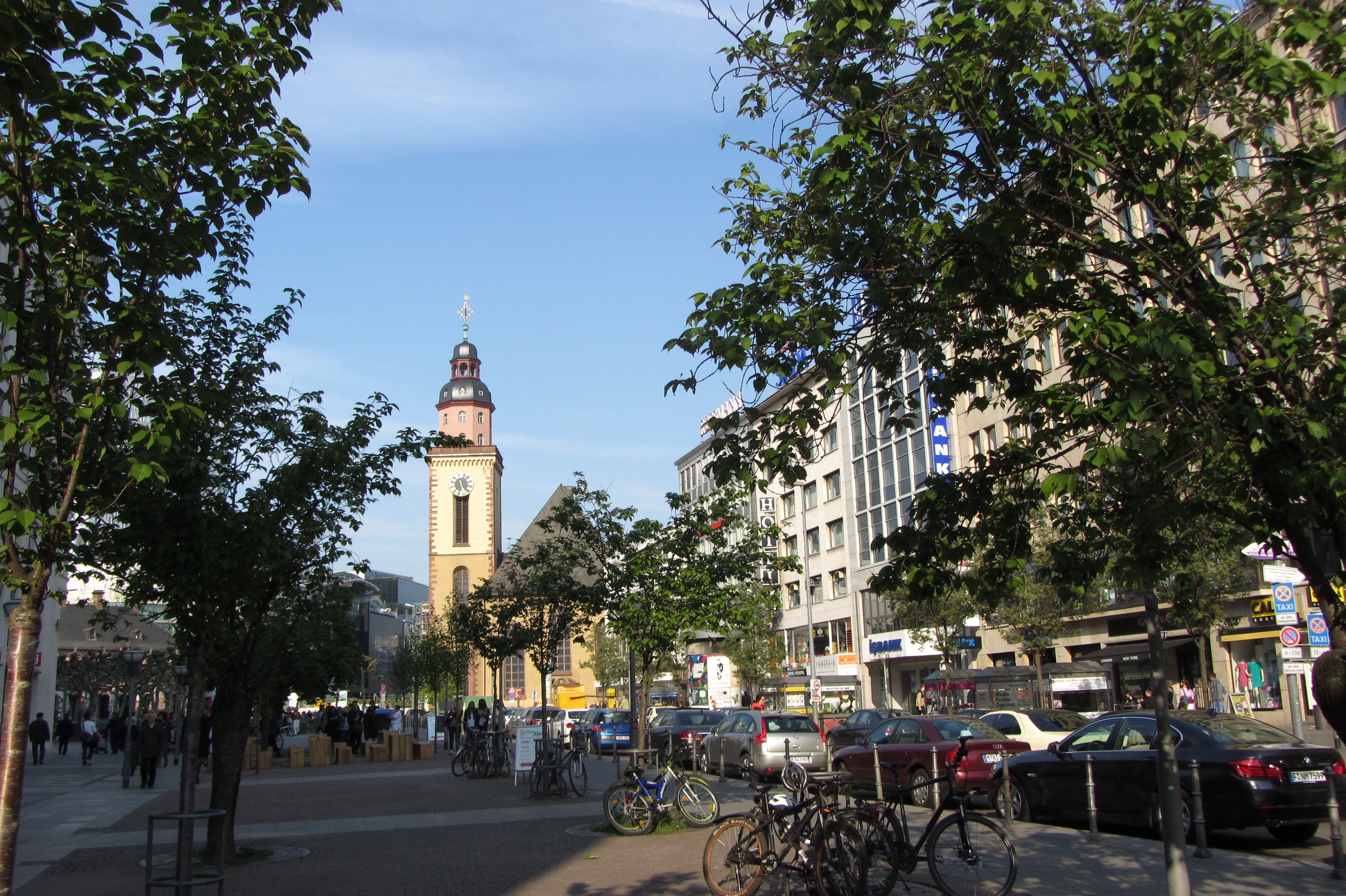 Die Südseite des Roßmarkts